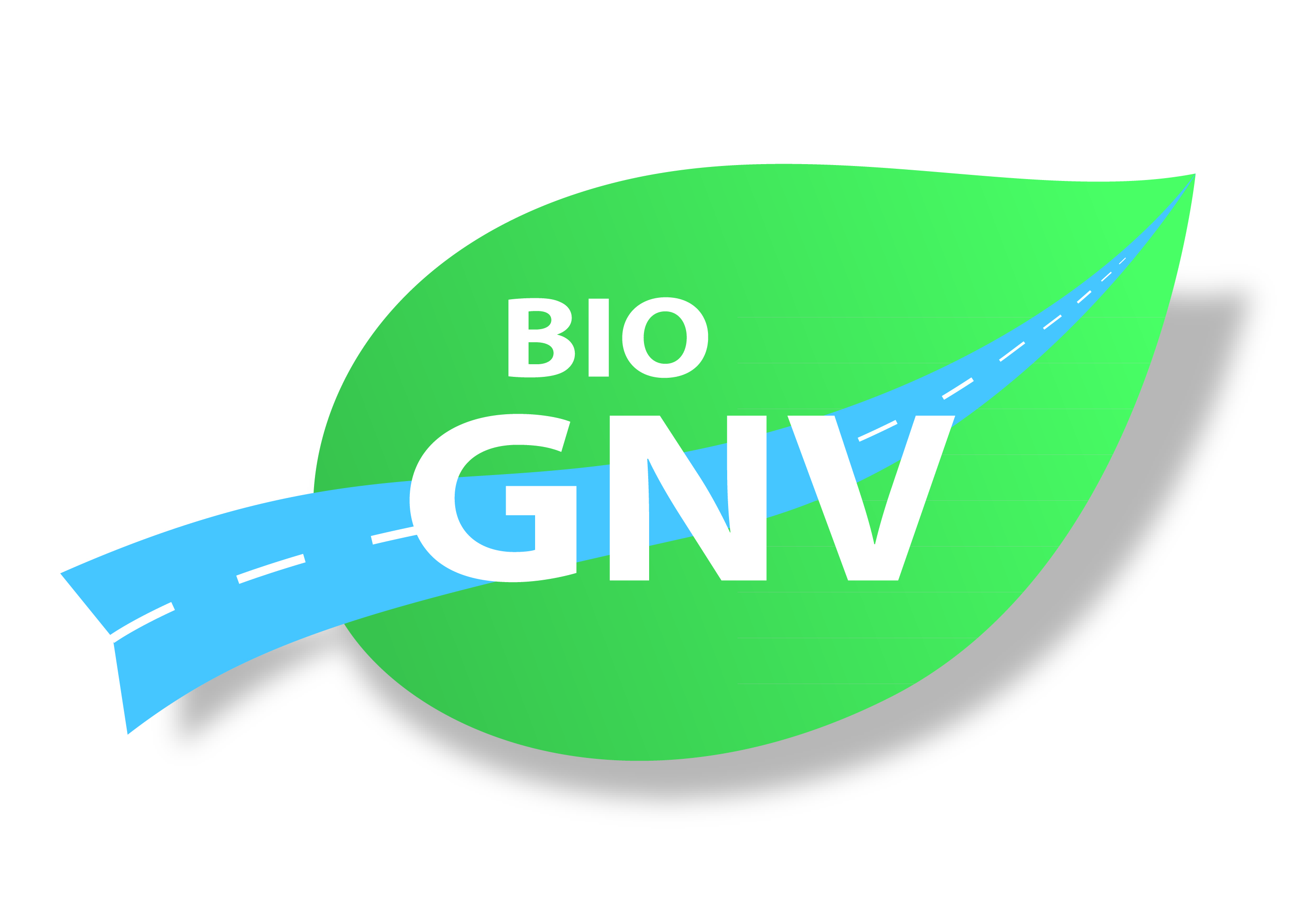 Logo créé par le Club Biogaz ATEE, pour utilisation sur véhicules, outils de communication dans un but de promotion de la filière